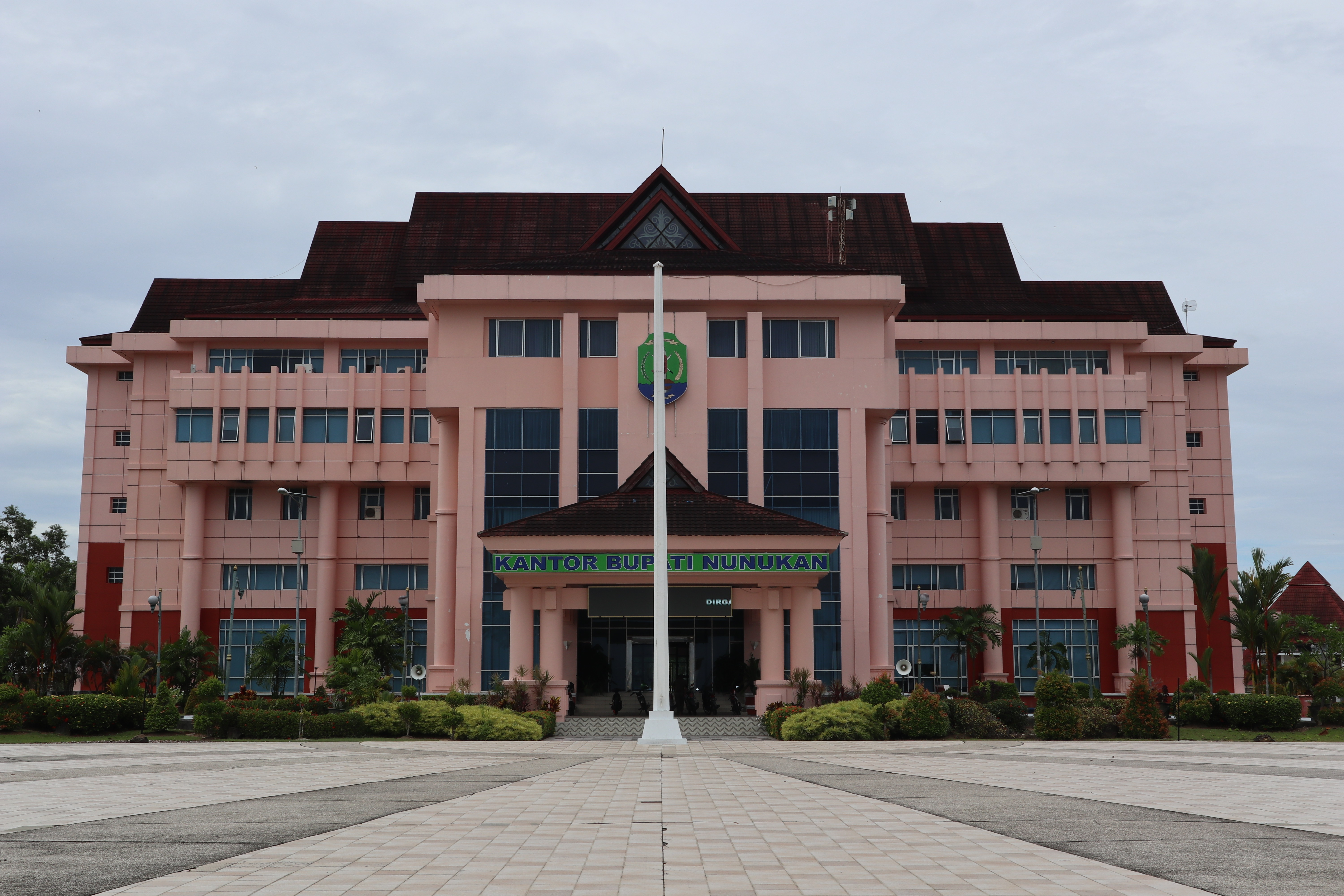 Kantor Bupati Nunukan di kota Nunukan.